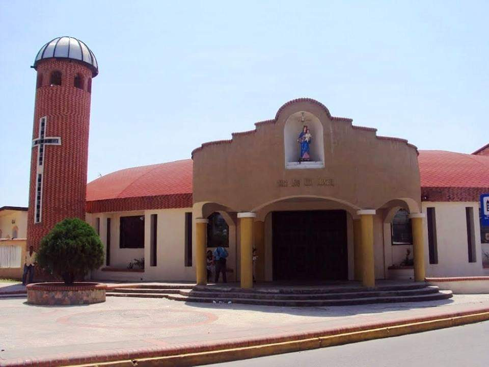 Iglesia Nuestra Señora del Rosario